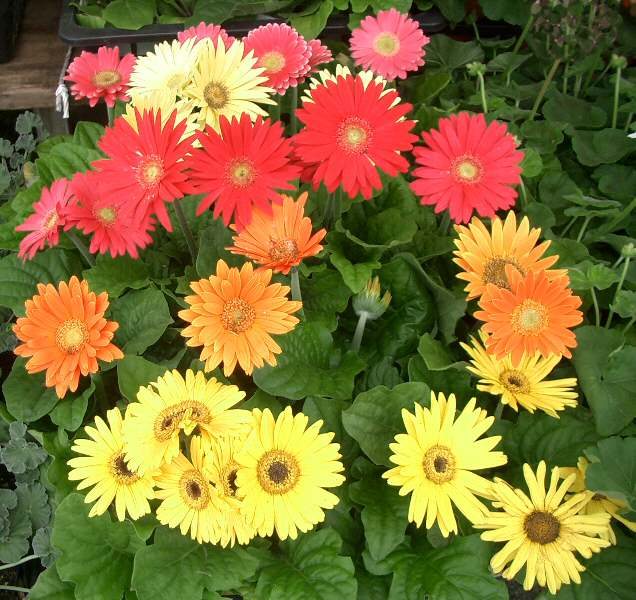 ガーベラ（2004年10月10日投稿者自身による撮影）